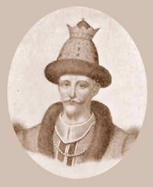 Георгий (Юрий II) Болеслав - князь галицкий